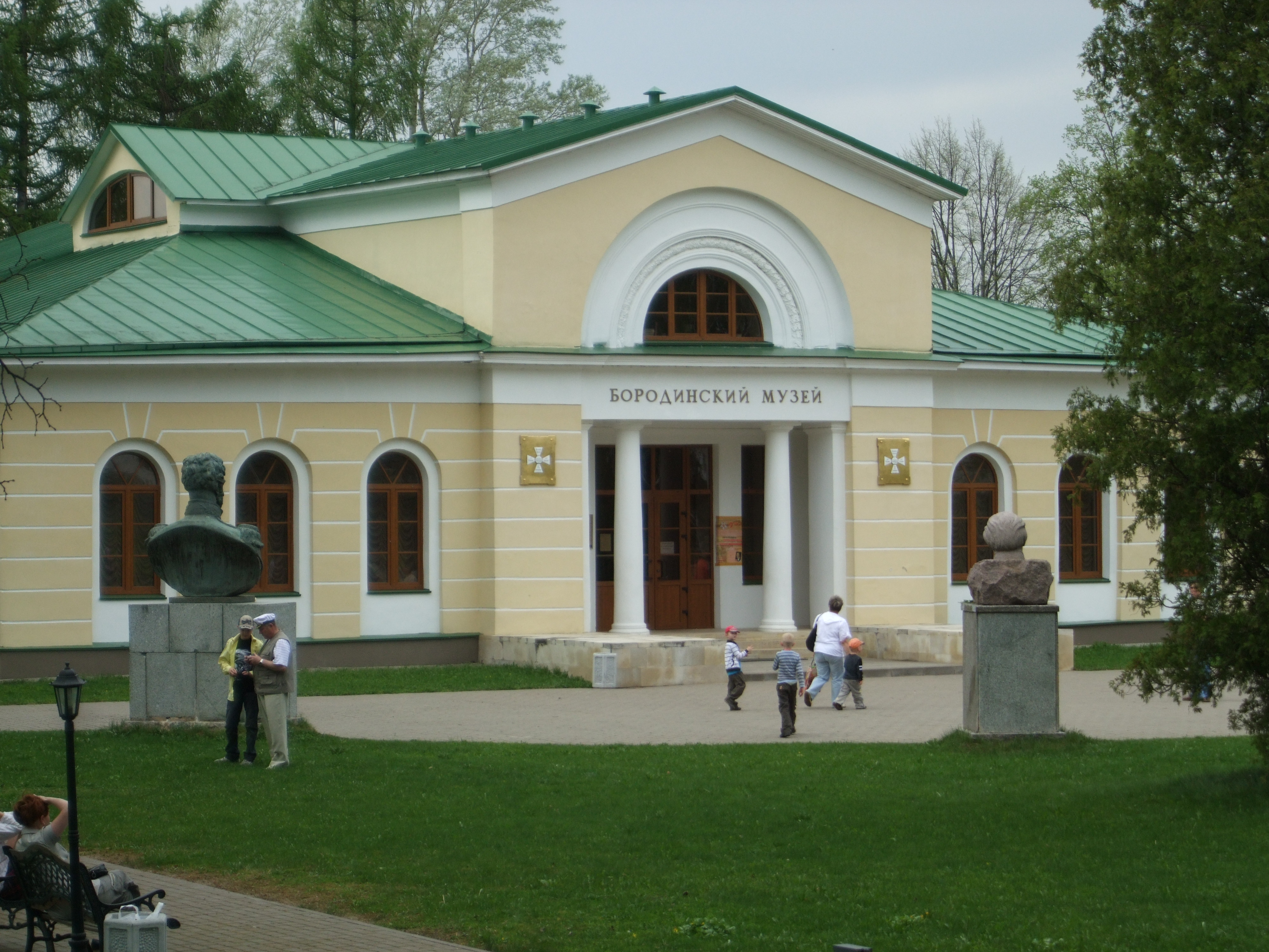 O edifício principal do Museu de Borodino, 2010